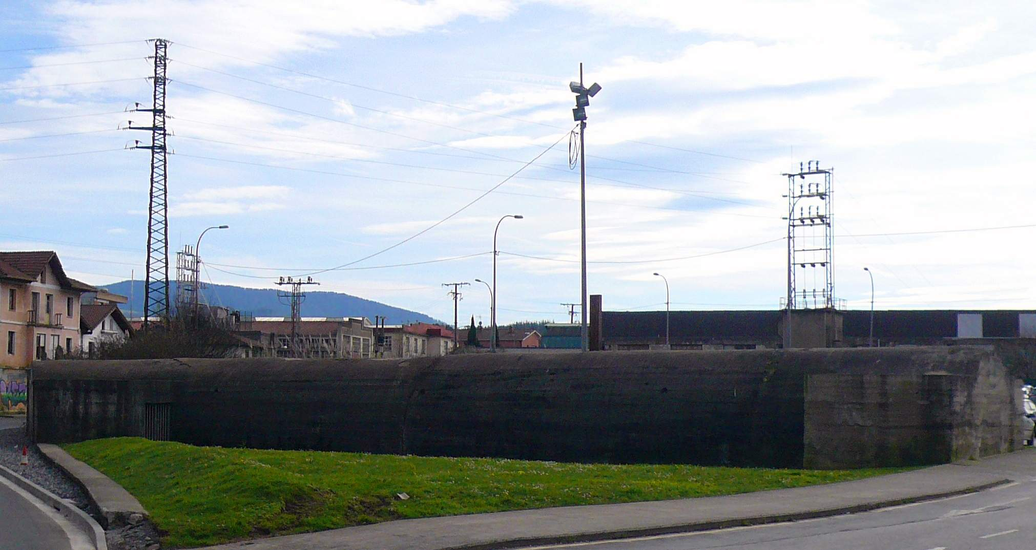 Refugio antiaéreo de la Guerra Civil en Guernica